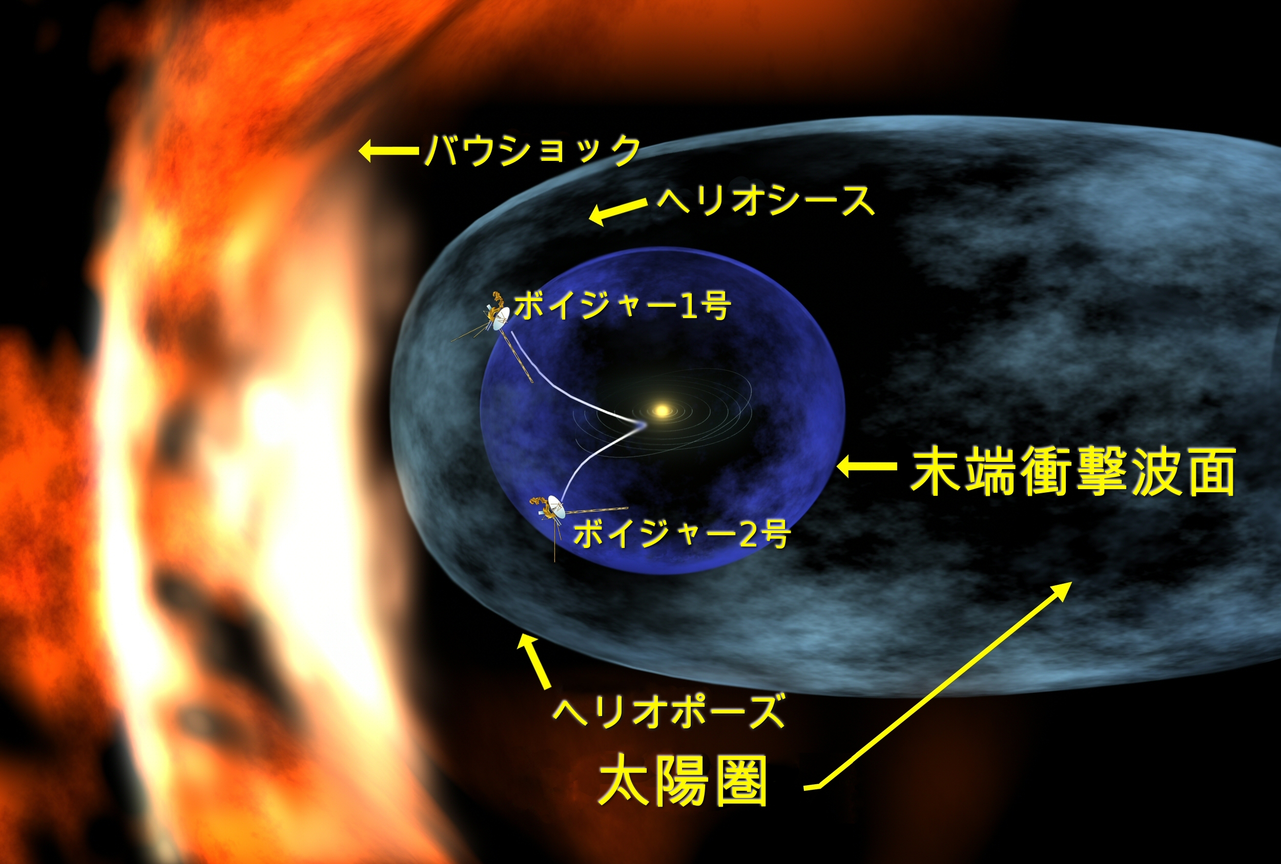 ヘリオポーズとボイジャー1号・2号の位置（2006年6月）（イラスト）